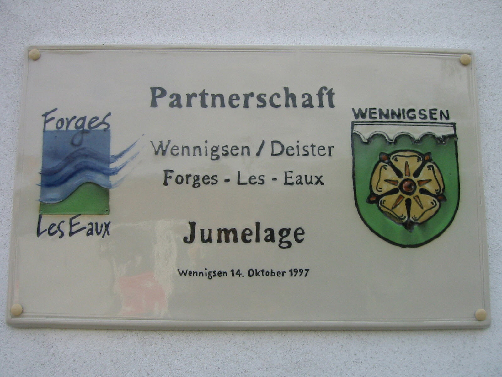 Partnerschaft der Gemeinde Wennigsen mit Forges-les-Eaux/Frankreich